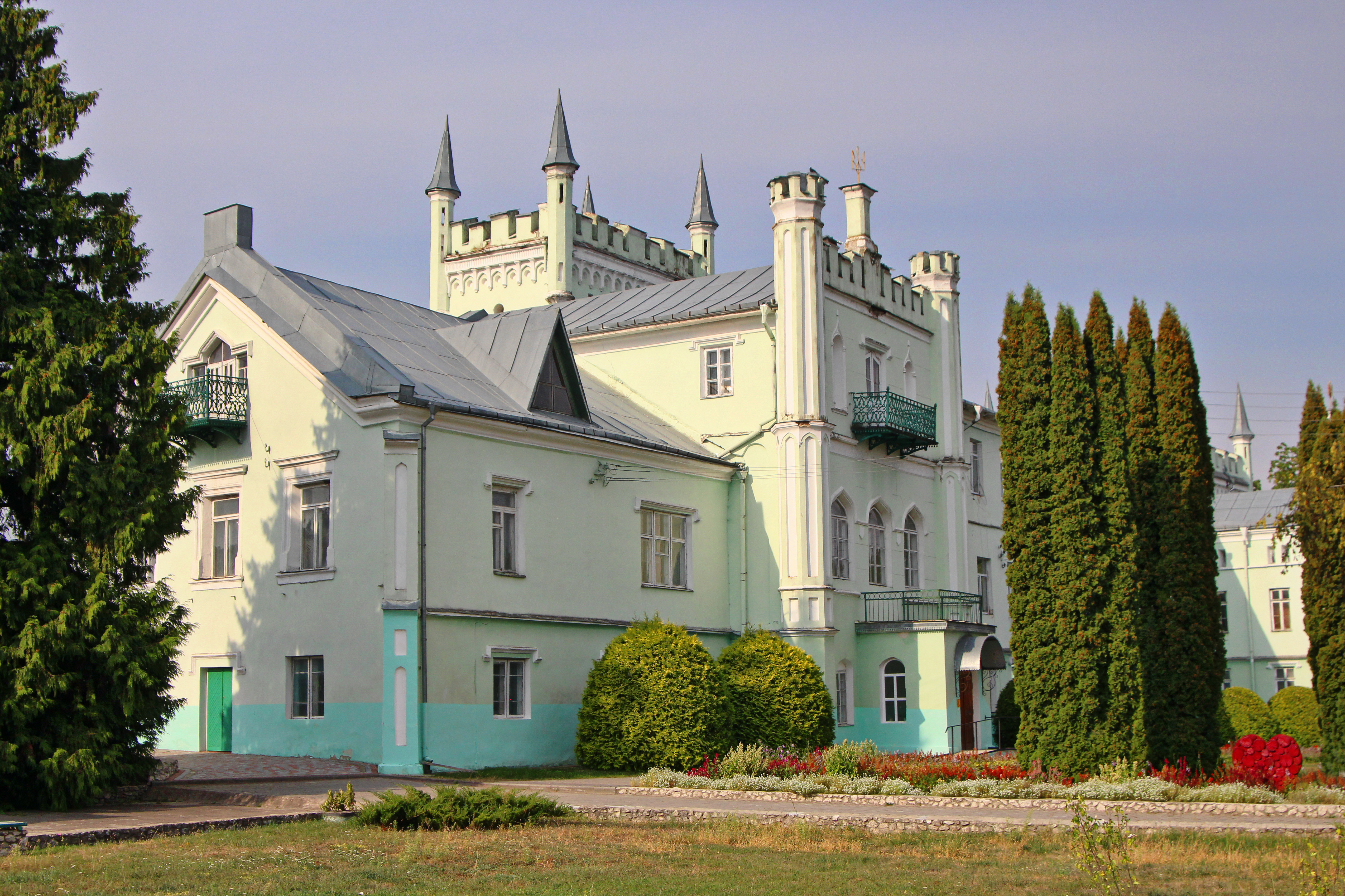 Замок, Білокриниця